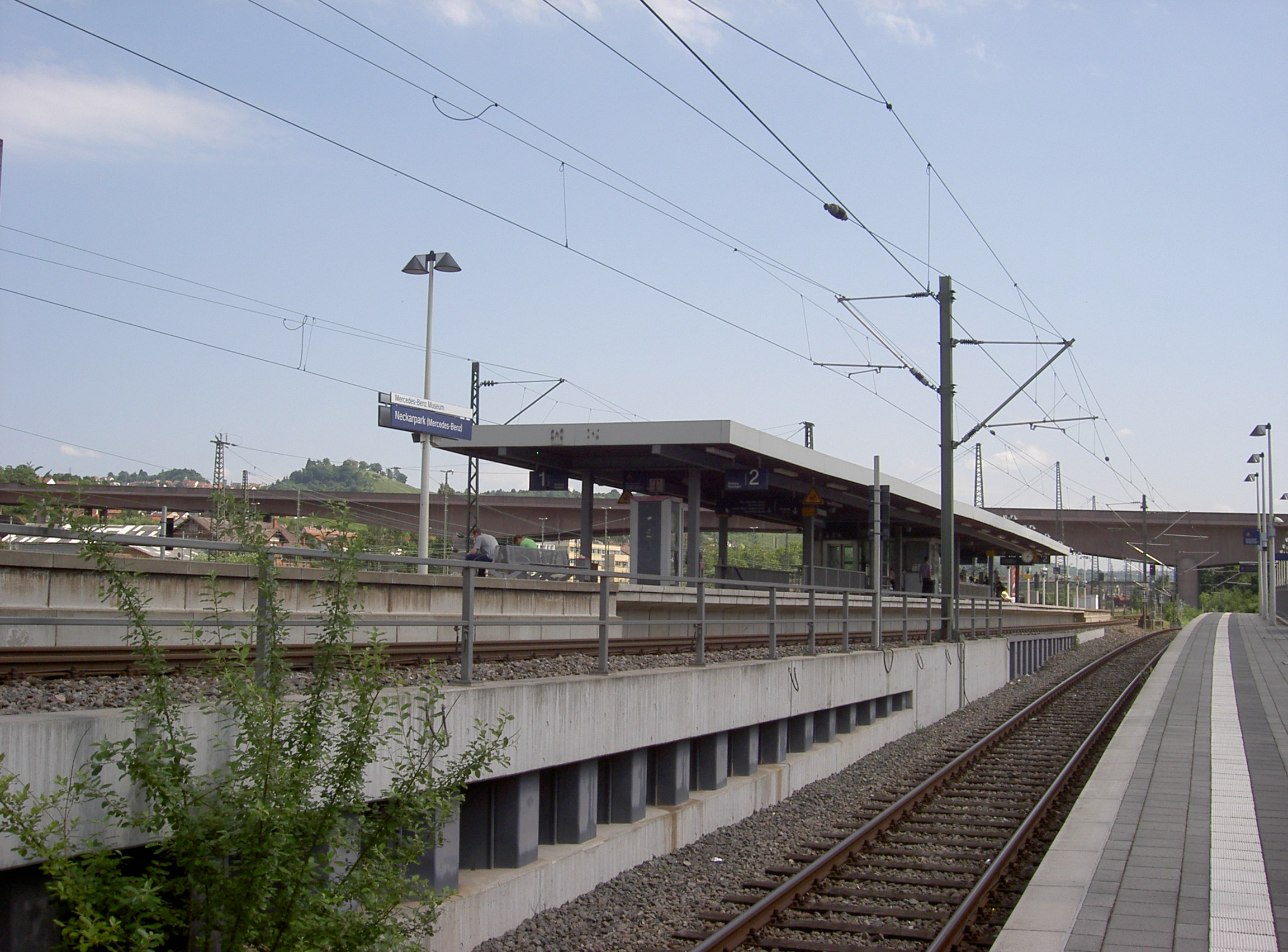 Haltepunkt Stuttgart Neckarpark